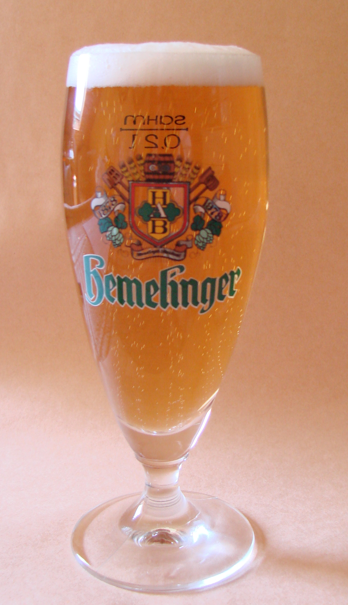 Hemelinger Spezial Beer from Bremen